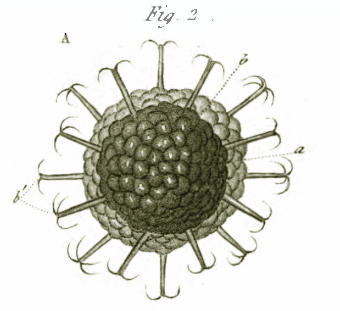 Détail du statoblaste de Cristatella Mucedo ou Cristatelle ; Image retravaillée (nettoyée) à partir d'une illustration ancienne présentée à l'Académie des sciences réalisée fin 1836 ou début 1837, à partir d'observations faites au microscope optique, par le naturaliste et célèbre illustrateur Pierre Jean François Turpin, et publiée dans les "Annales des sciences naturelles comprenant la zoologie, la botanique, l'anatomie, et la physiologie comparée des deux règnes, et l'histoire des corps organisés fossiles", seconde série, Tome VII, imprimé chez Paul Renouard, Paris, 417 pages